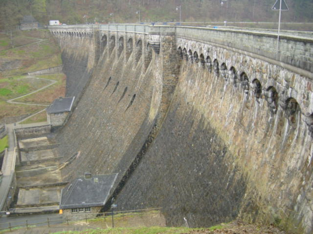 Staumauer der Diemeltalsperre. Selbst fotografiert April 2005.